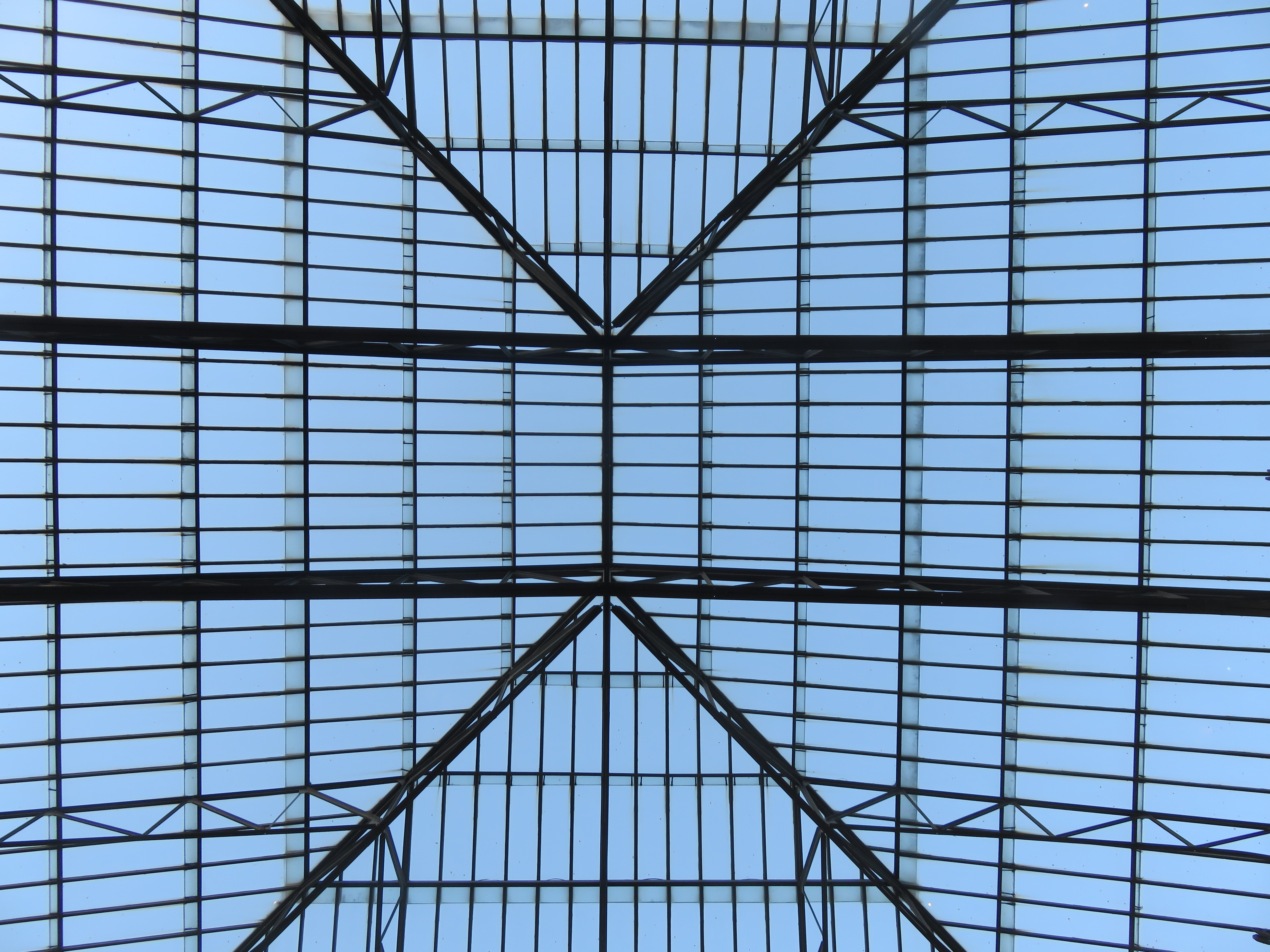 Copertura in metallo e vetro del cortile d'onore interno, che così è completamente protetto.